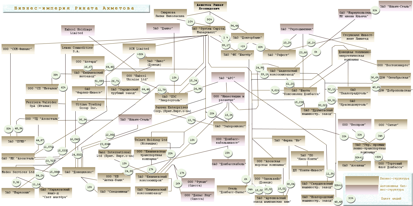 Akhmetov_corp